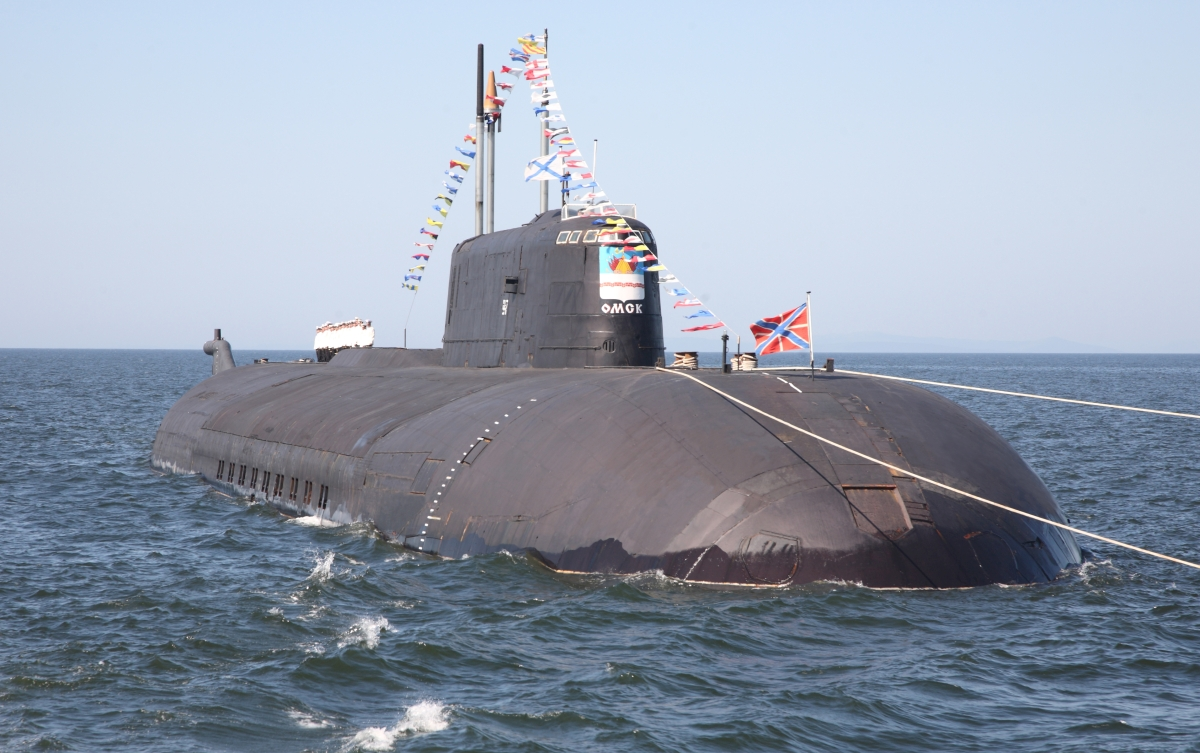 АПЛ Омск. Парад ВМФ Владивосток 2008.07.25